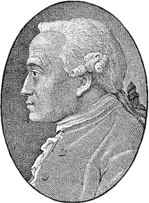 personagem Immanuel Kant